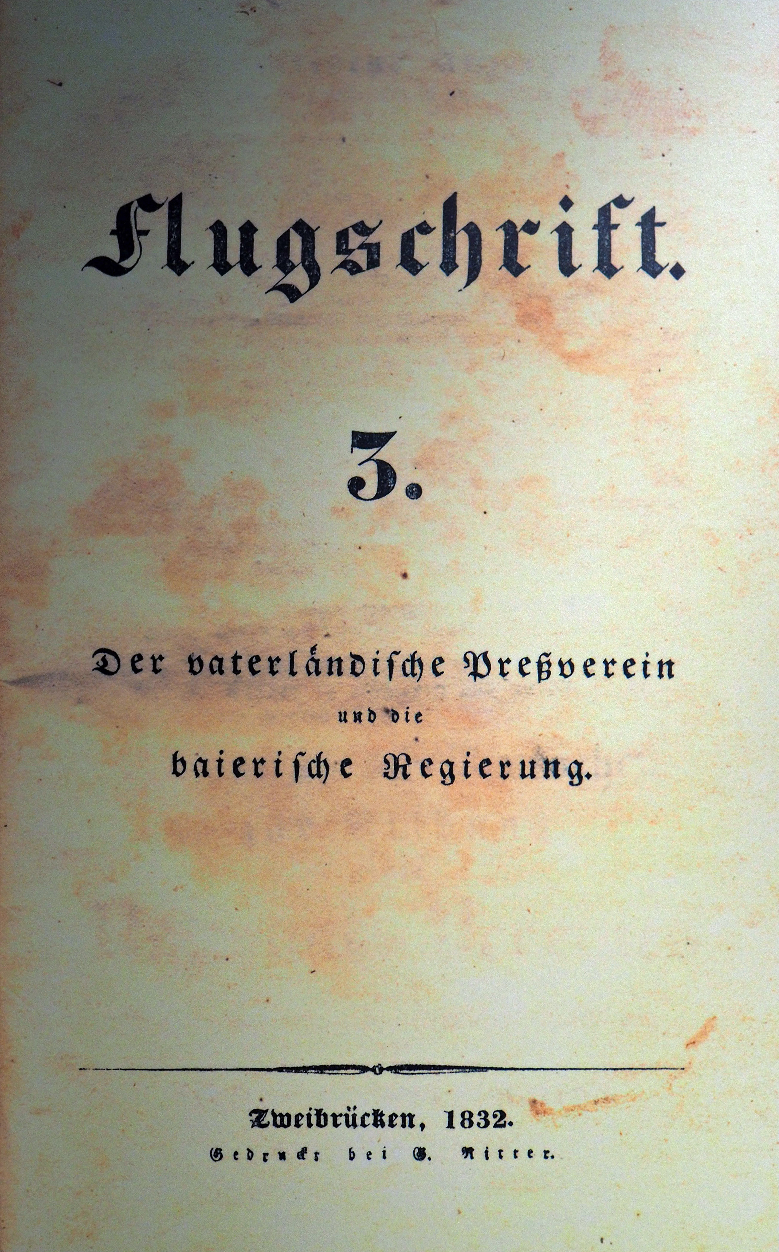 Titelblatt der Flugschrift 3 des Deutschen Preß- und Vaterlandsvereins, gedruckt von Georg Ritter